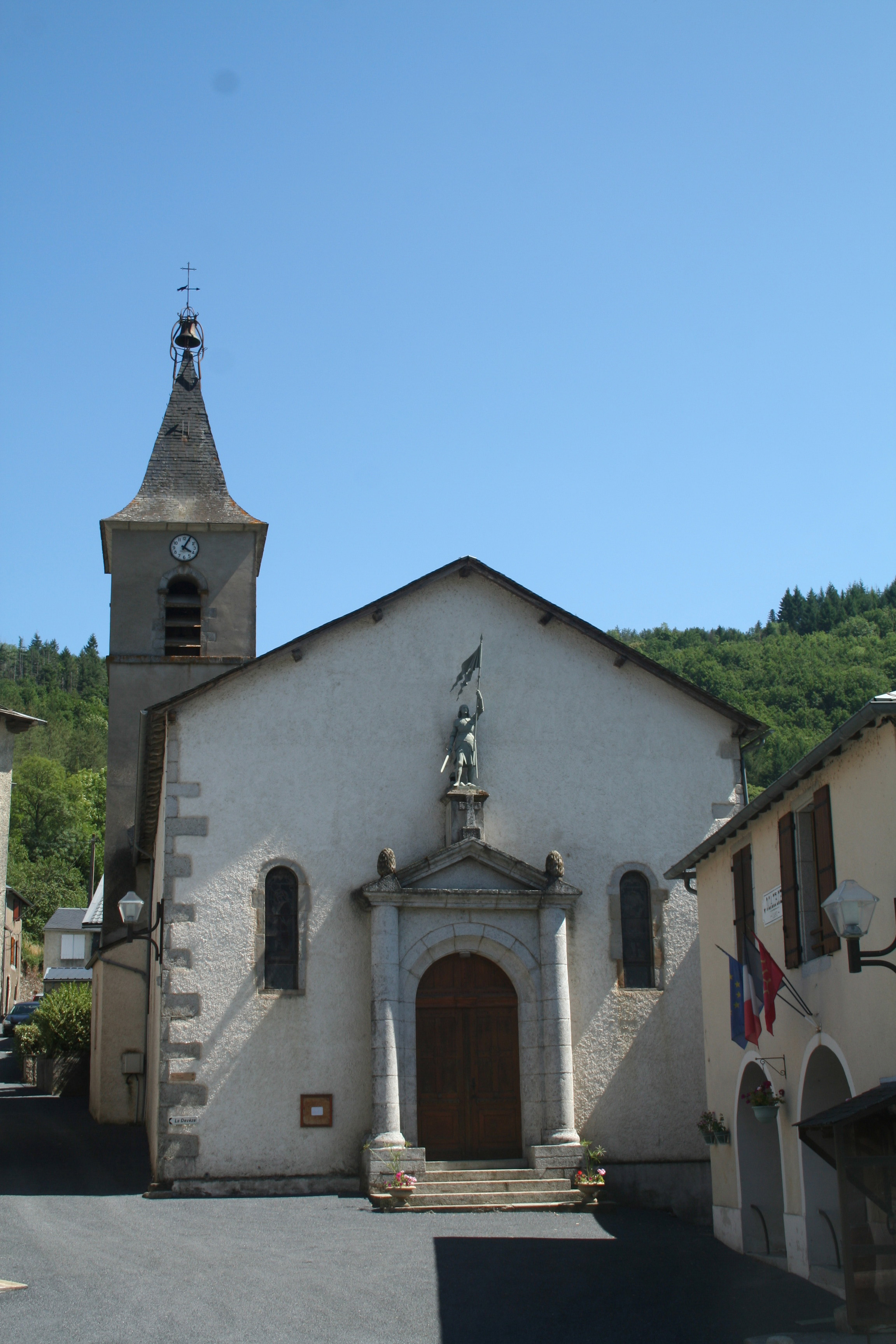 Lacaze (Tarn) - église Notre-Dame.